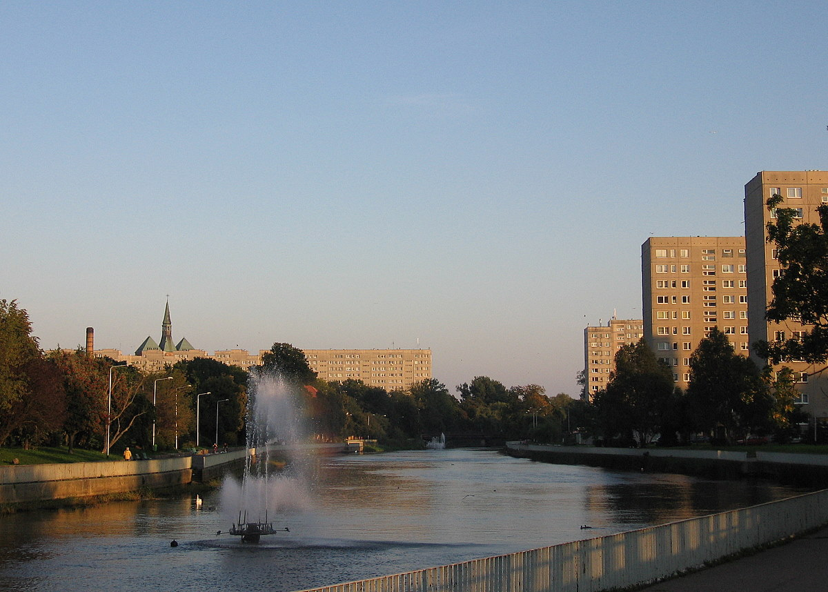 Rzeka Parsęta w Kołobrzegu i zabudowa miasta